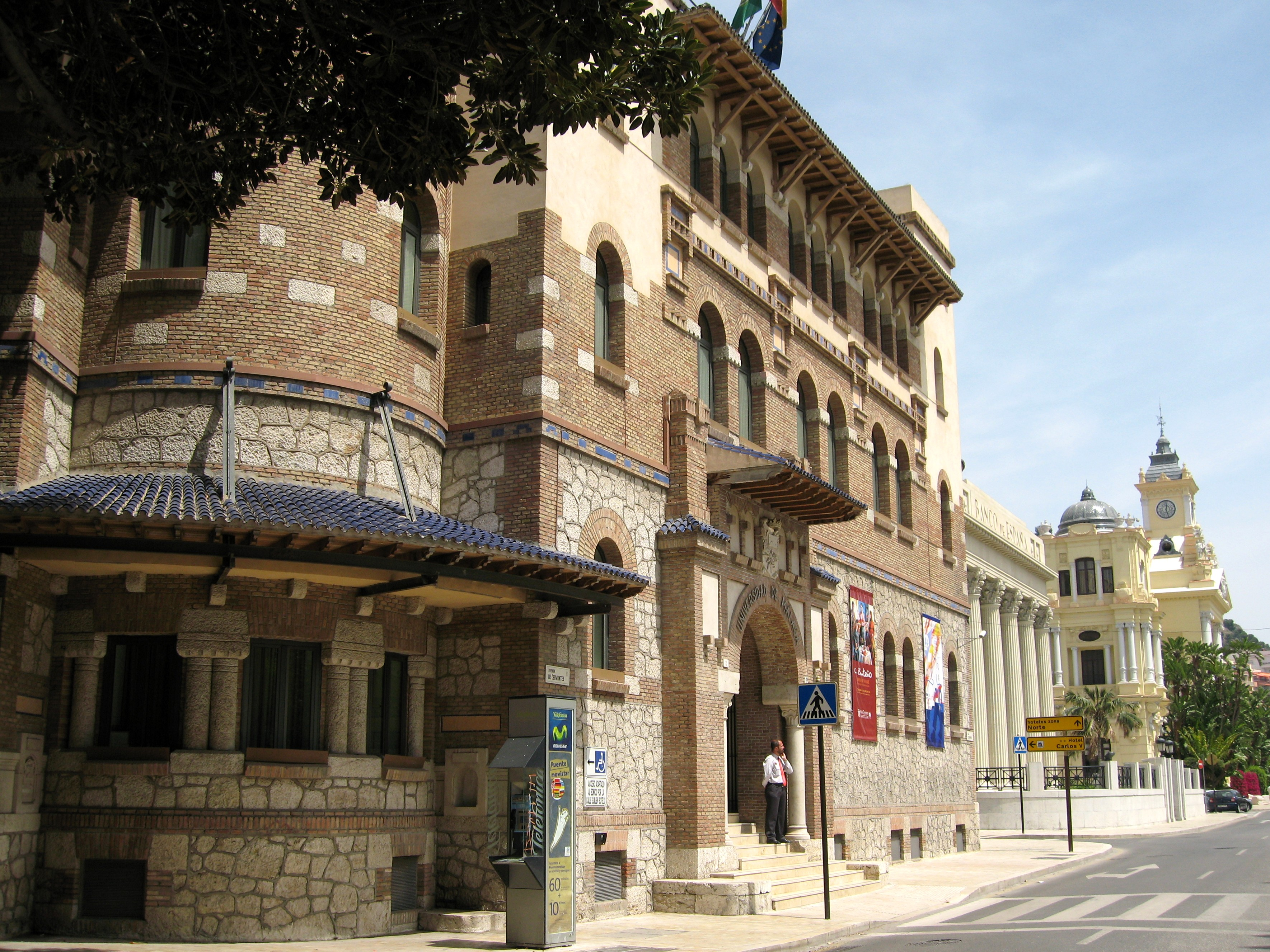 Universität von Málaga, Andalusien, Spanien